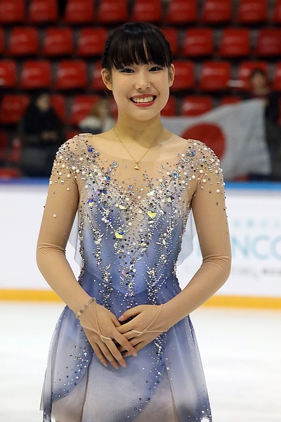 Маи Михара на этапе Гран-при во Франции (ноябрь 2018)